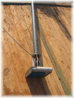 Zelf gemaakt